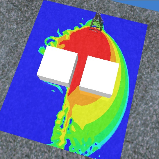 Champ et matériaux